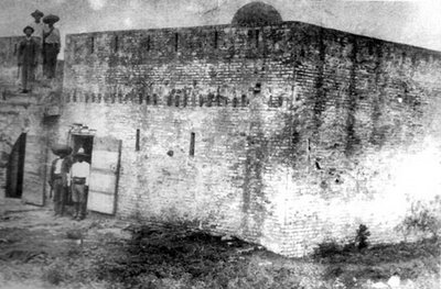 Imagen del fuerte Casamata de 1915, durante el ataque villista